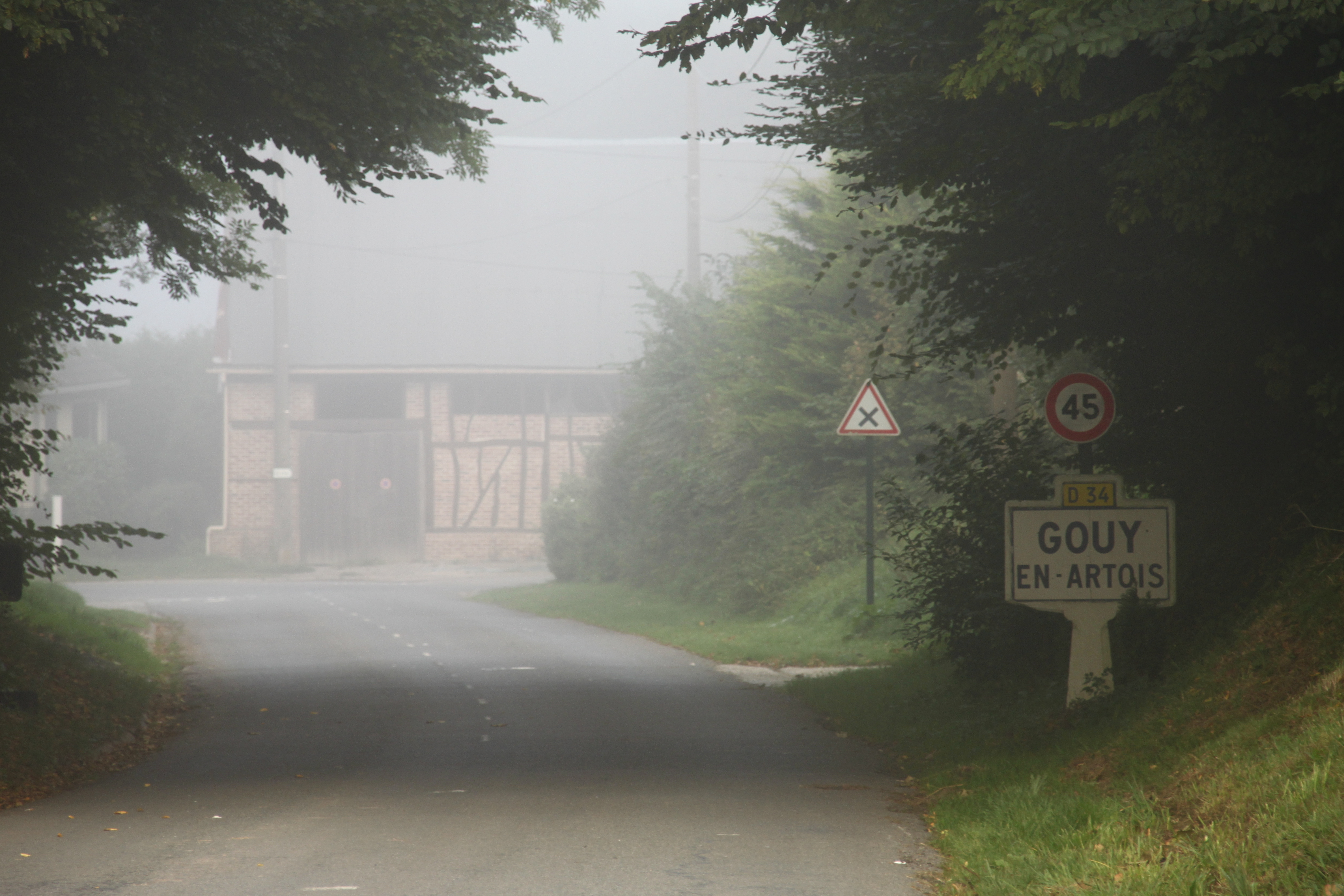 Gouy-en-Artois (Pas-de-Calais) city limit sign. brume matinale automnale / autumn morning mist. Je ne sais plus où c'était... I do not remember the location...